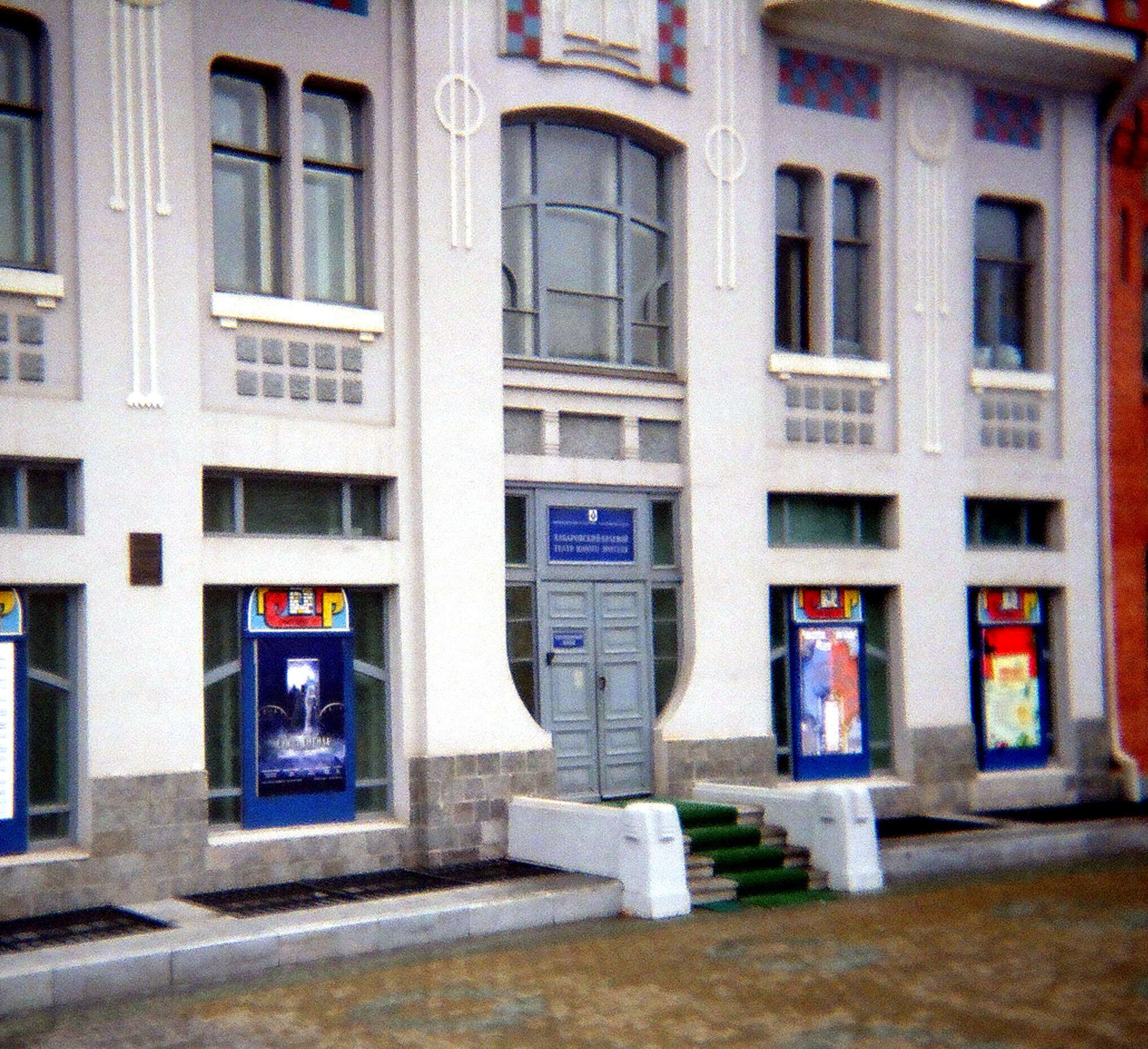 Théâtre de jeune spectateur à Khabarovsk